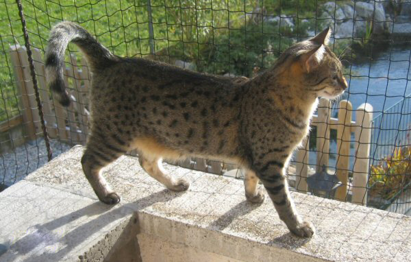 MU ARAE's Nikita Mau égyptien bronze